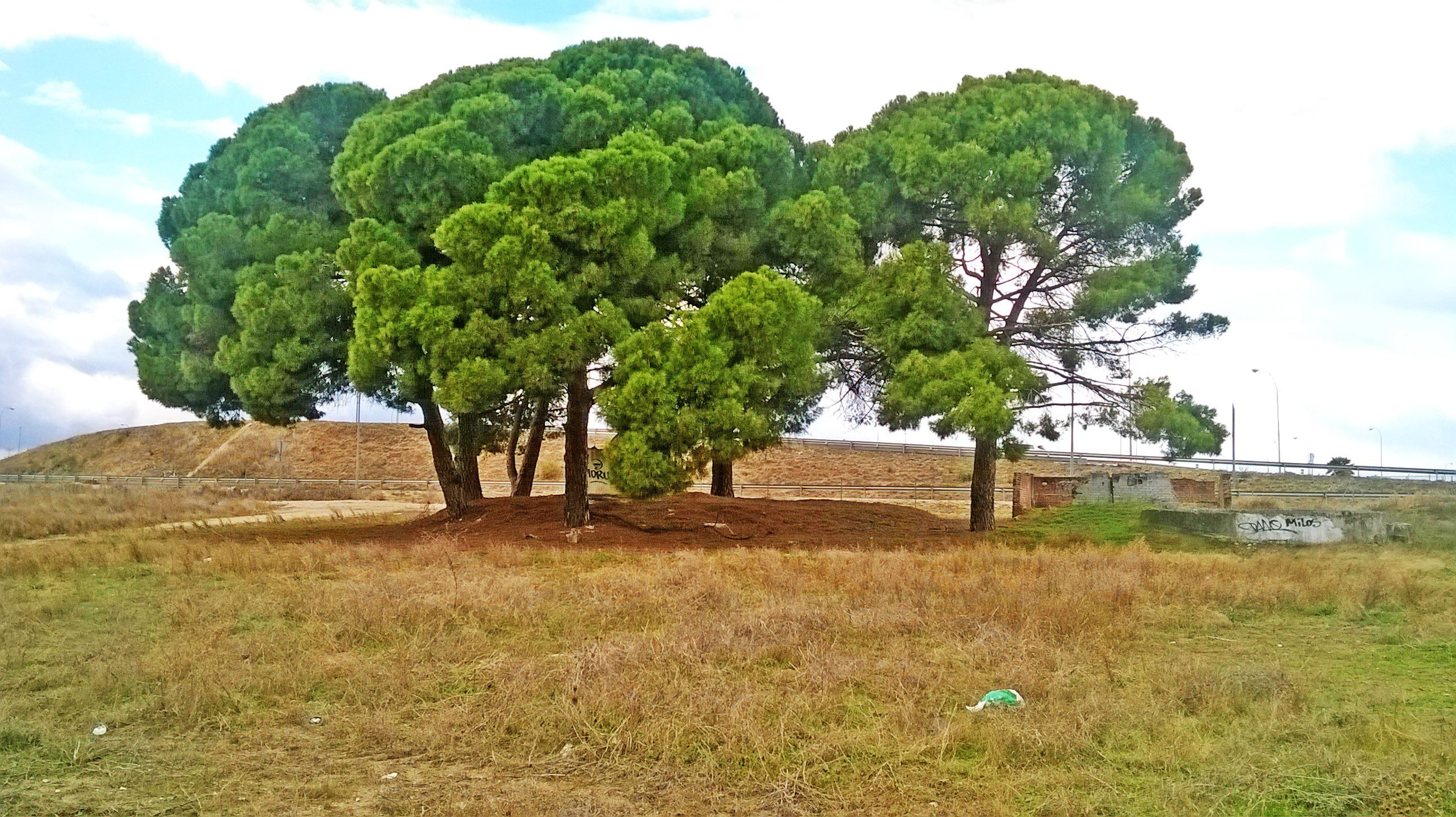 Zona de descanso de las vías pecuarias con sombraje de pinos y un antiguo pozo